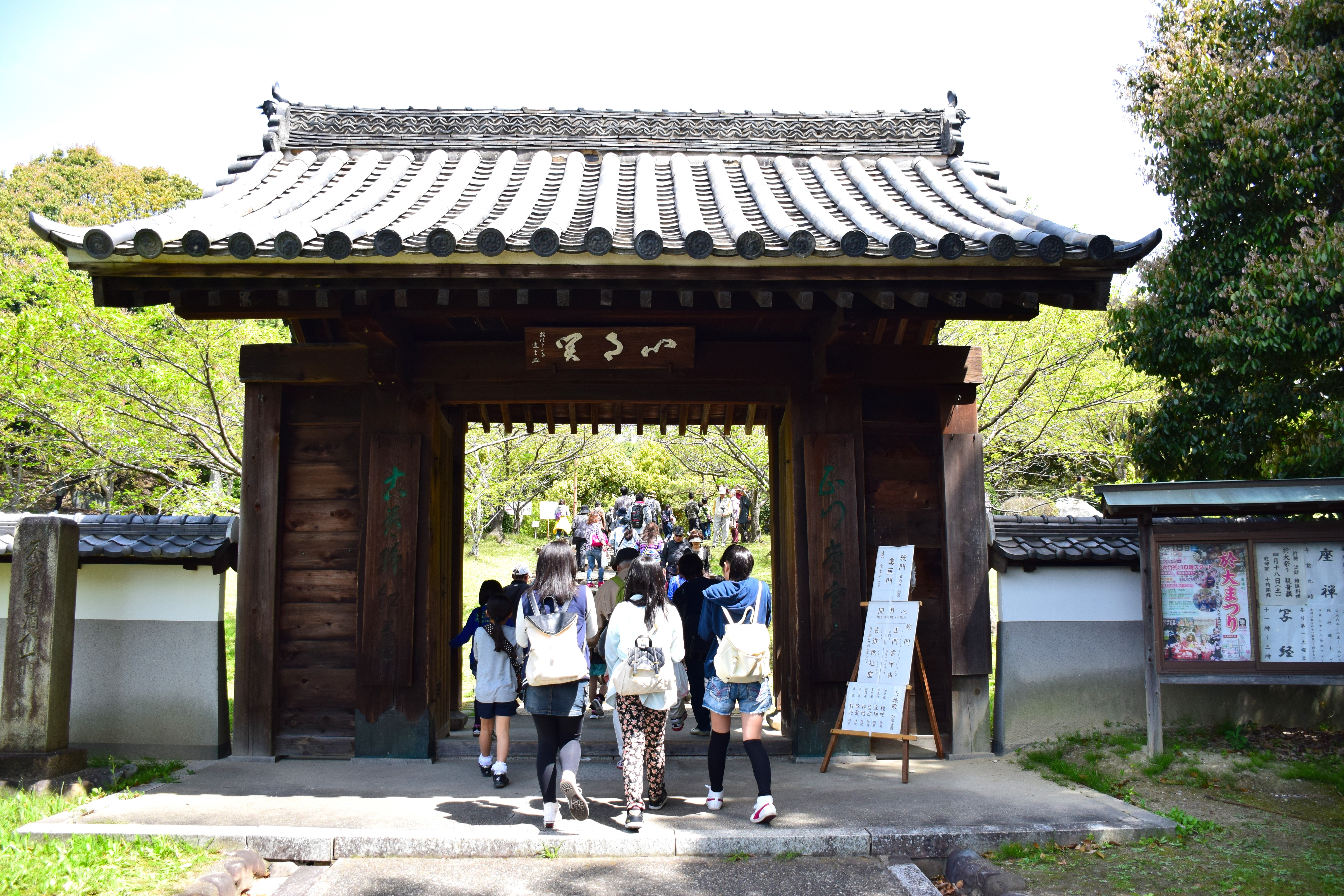 乾坤院総門